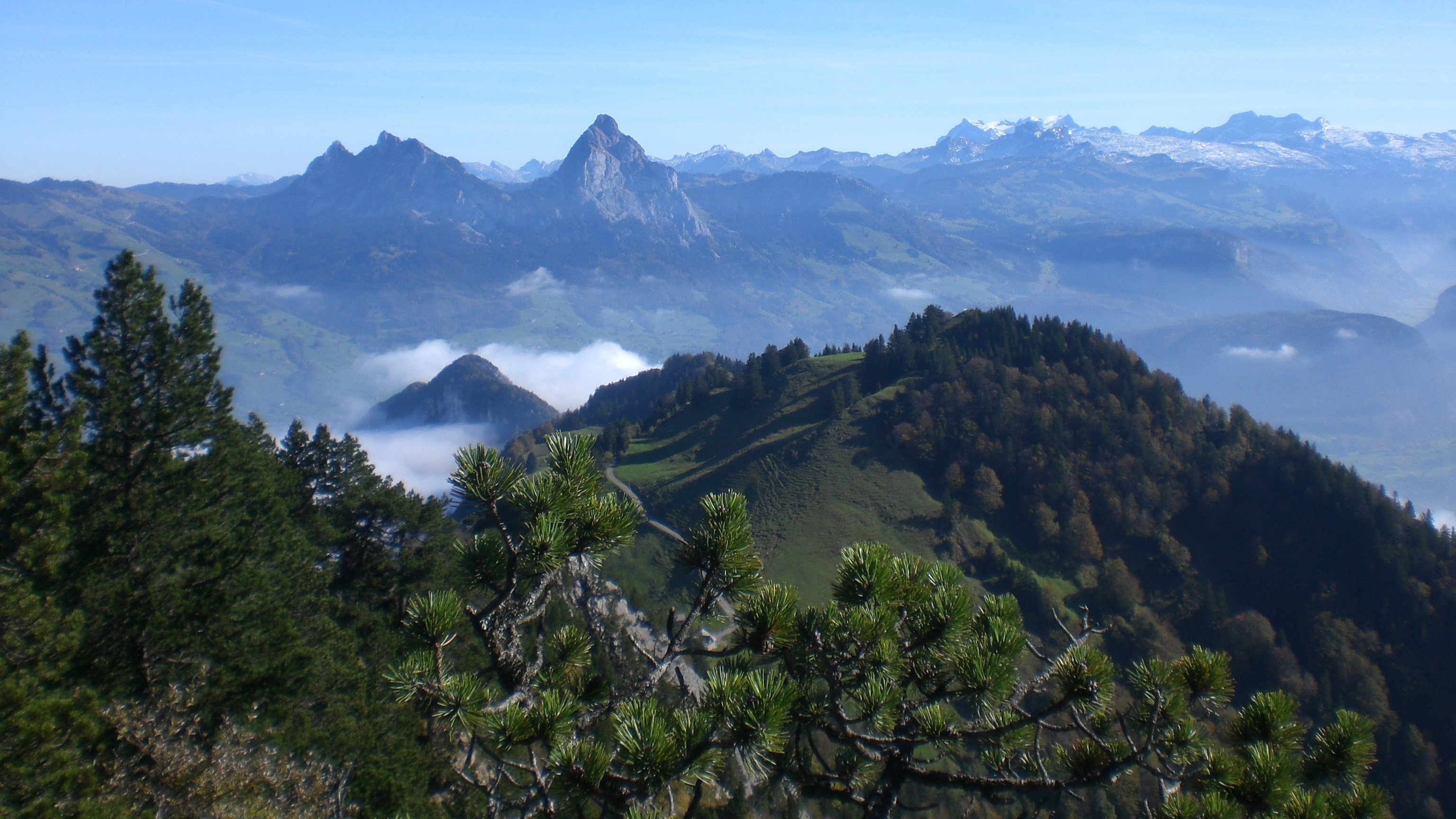 Blick auf Urmiberg & Gottertli (im Mittelgrund die Mythen) vom Anstieg auf Rigi-Hochflue aus ~1.400 m ü. M.